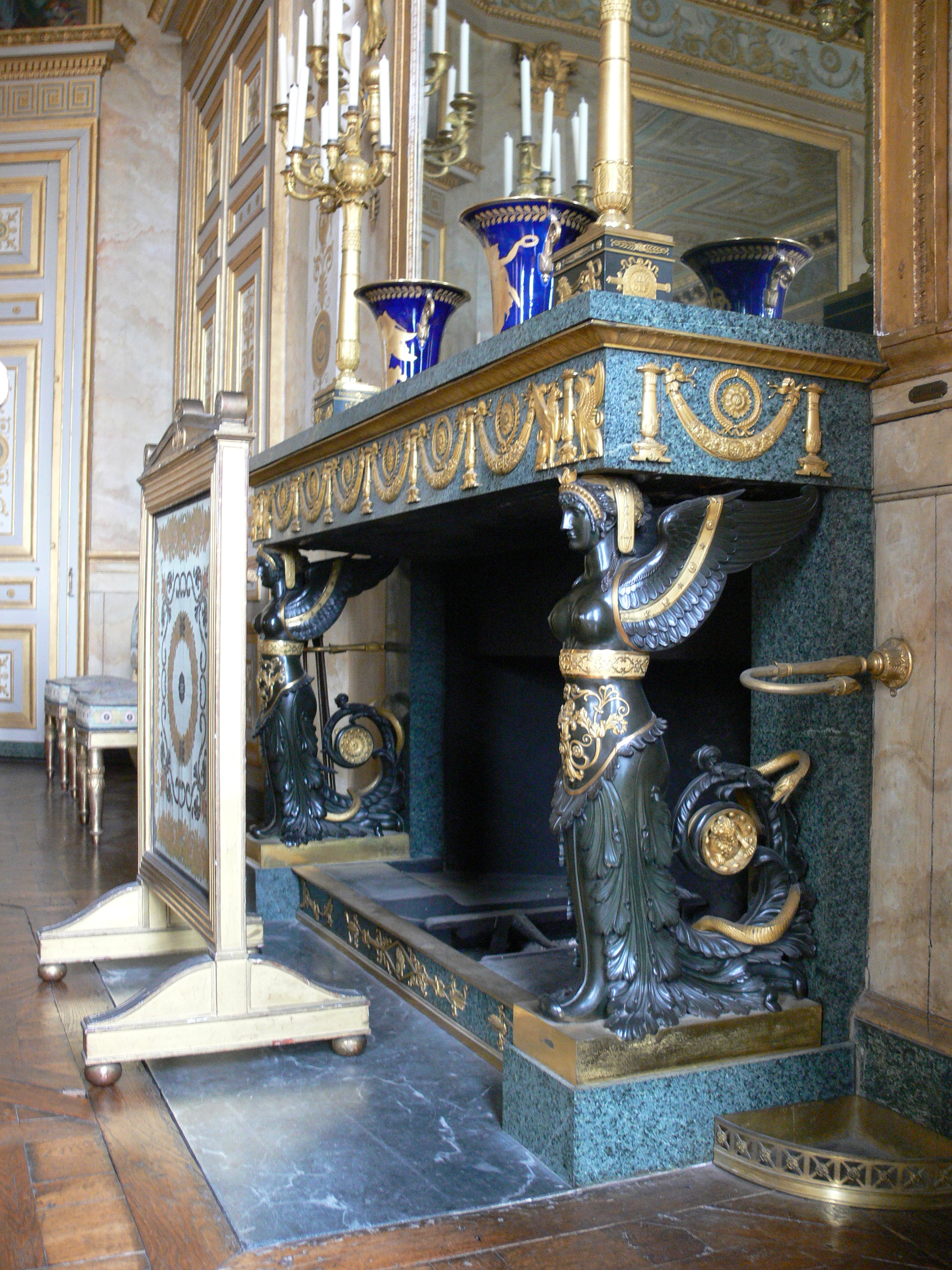 Compiègne, France: Château de Compiègne Les appartements historiques Grand salon de reception de l'imperatrice, cheminée